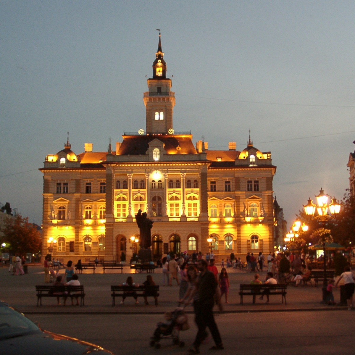 Novi Sad, Rathaus bei Nacht, Novi Sad, 02.08.2004